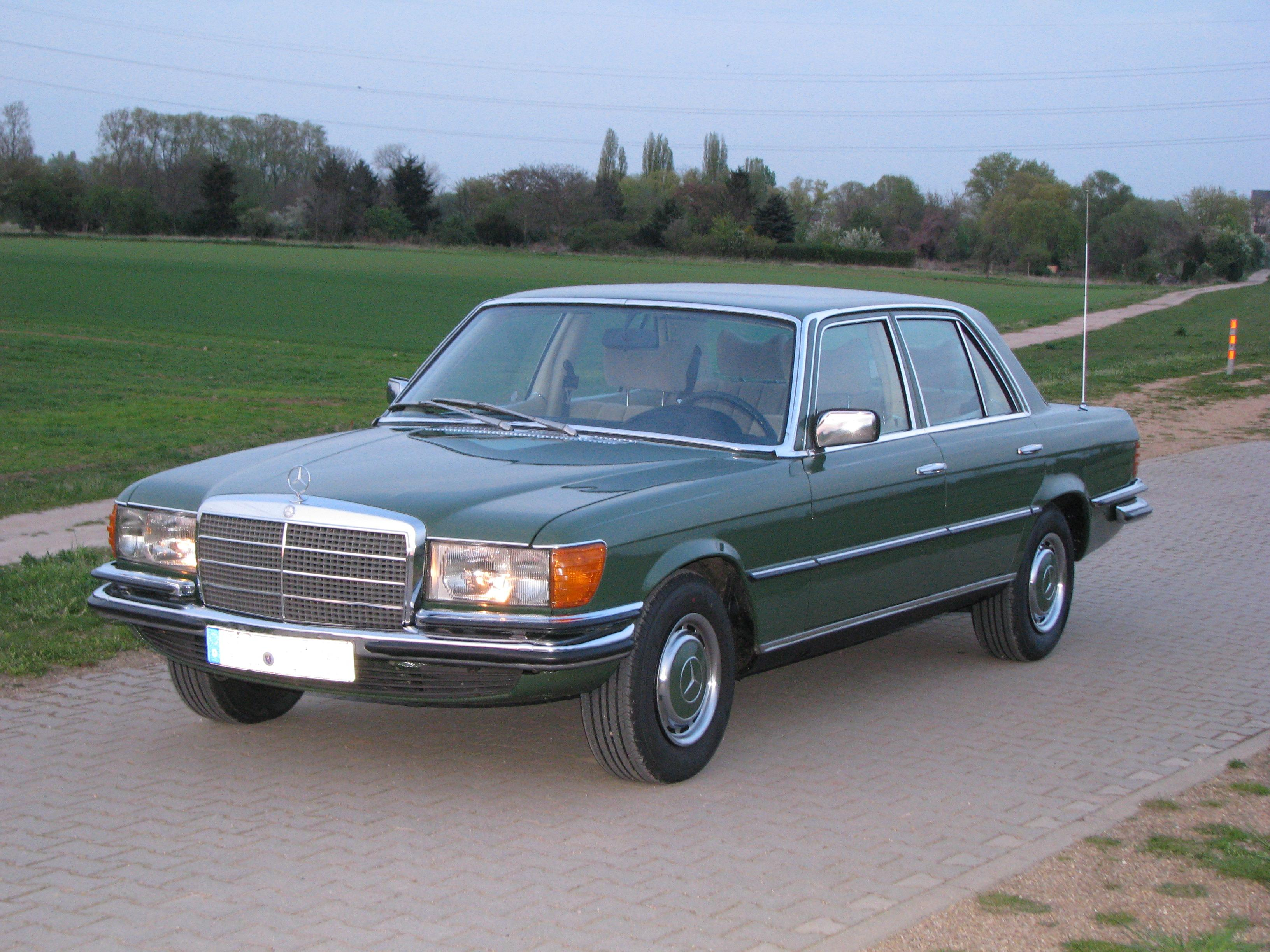 Mercedes 280 SE W116 11/1978